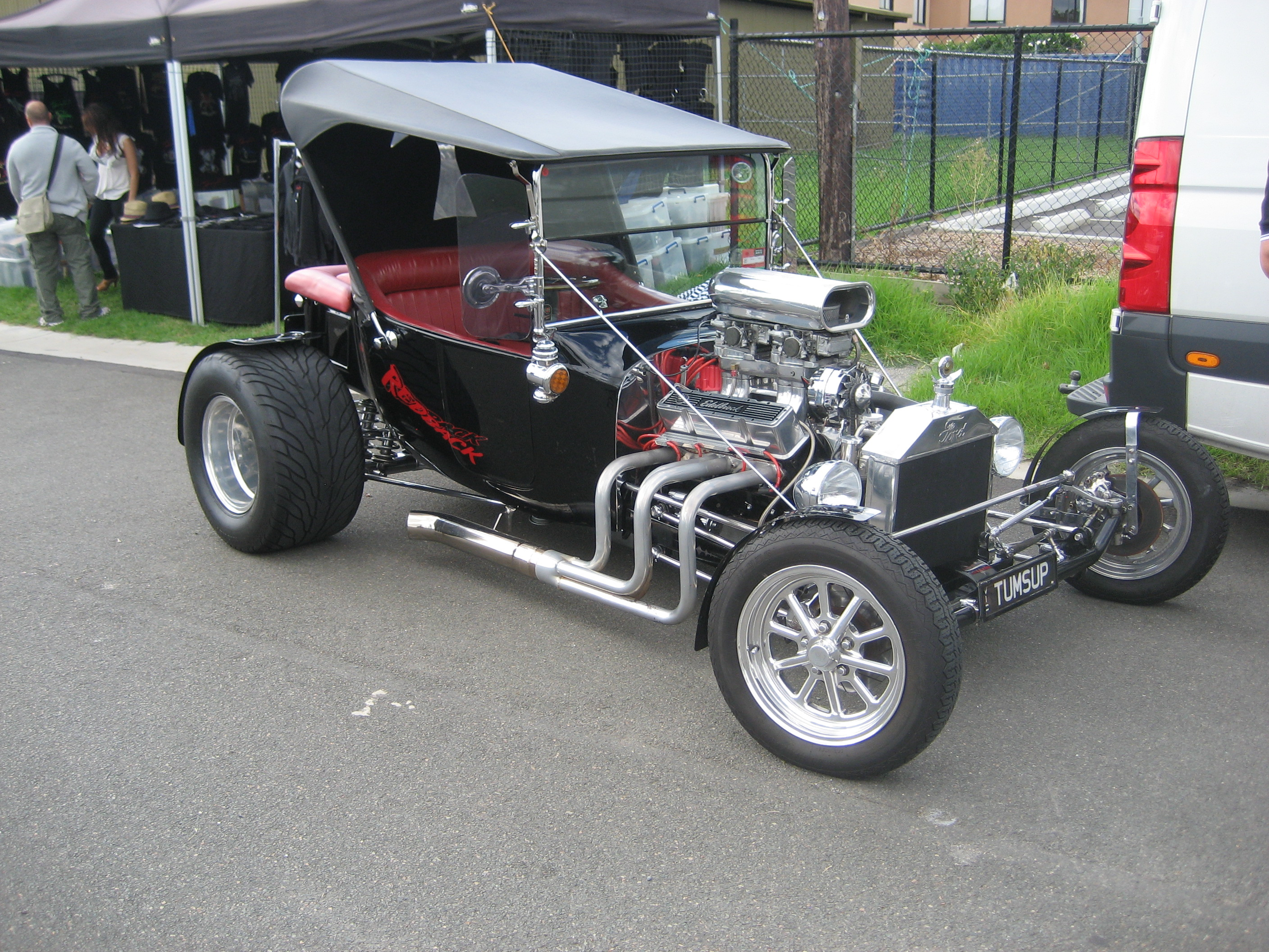 Ford Model T Bucket Hotrod